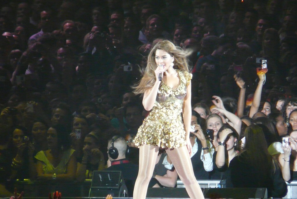 Irreplacable